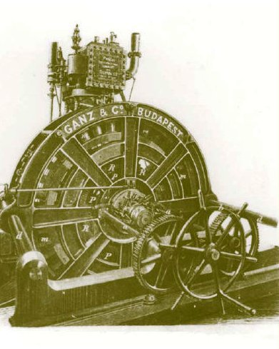 Mechwart András és Zipernowsky Károly egyfázisú generátorhoz közvetlenül kapcsolt gőzgépe (gőzvilágító). A gép hosszú ideig Budapesten a Keleti pályaudvar világítását táplálta.